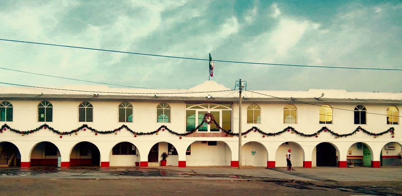 Oficinas ejidales de Cahuacán